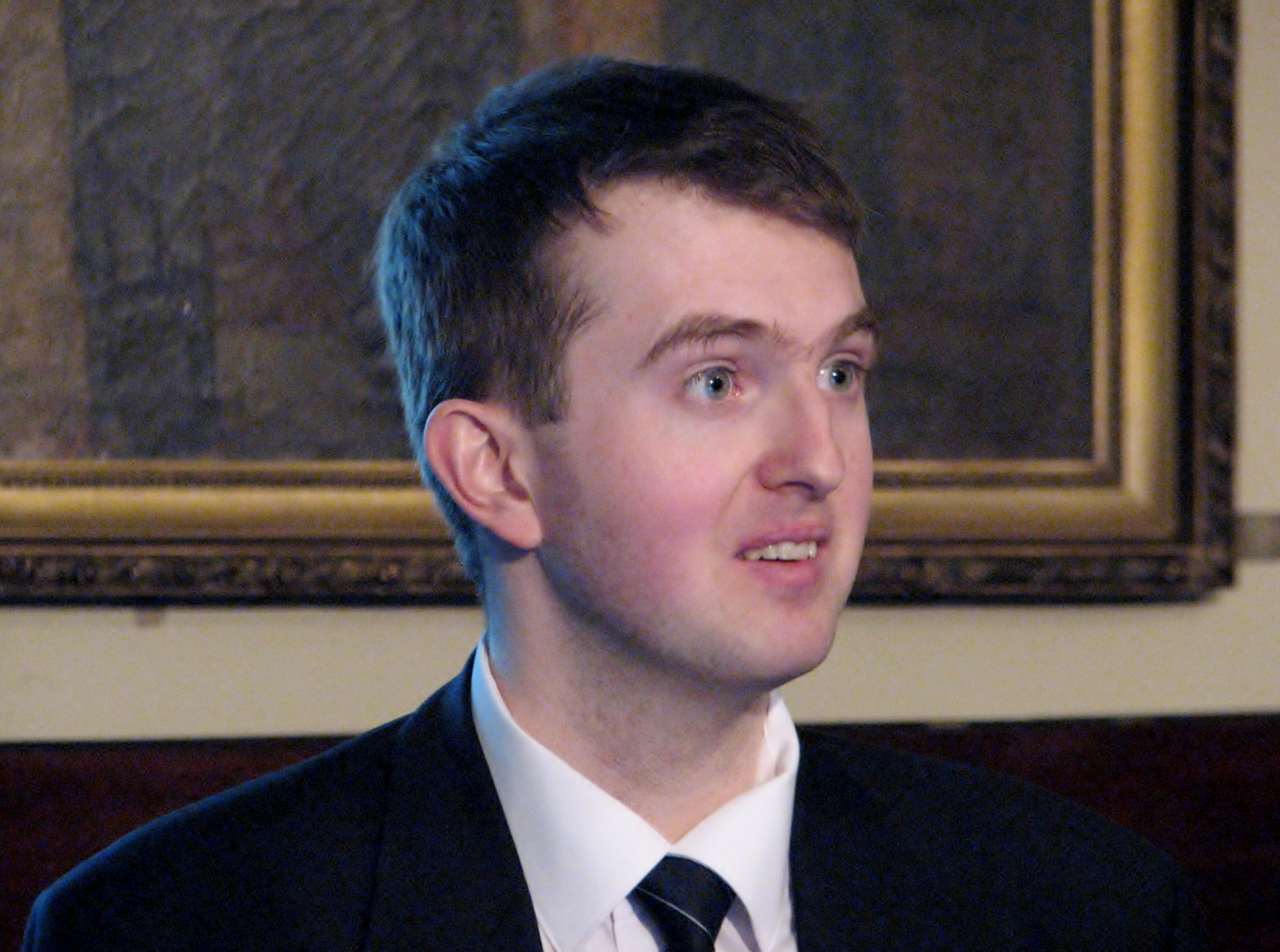 Sten Lassmann Eesti Teatri- ja Muusikamuuseumi sinise laega saalis esitlemas IV ja V heliplaati sarjast ”Heino Elleri kogutud klaveriteosed”.